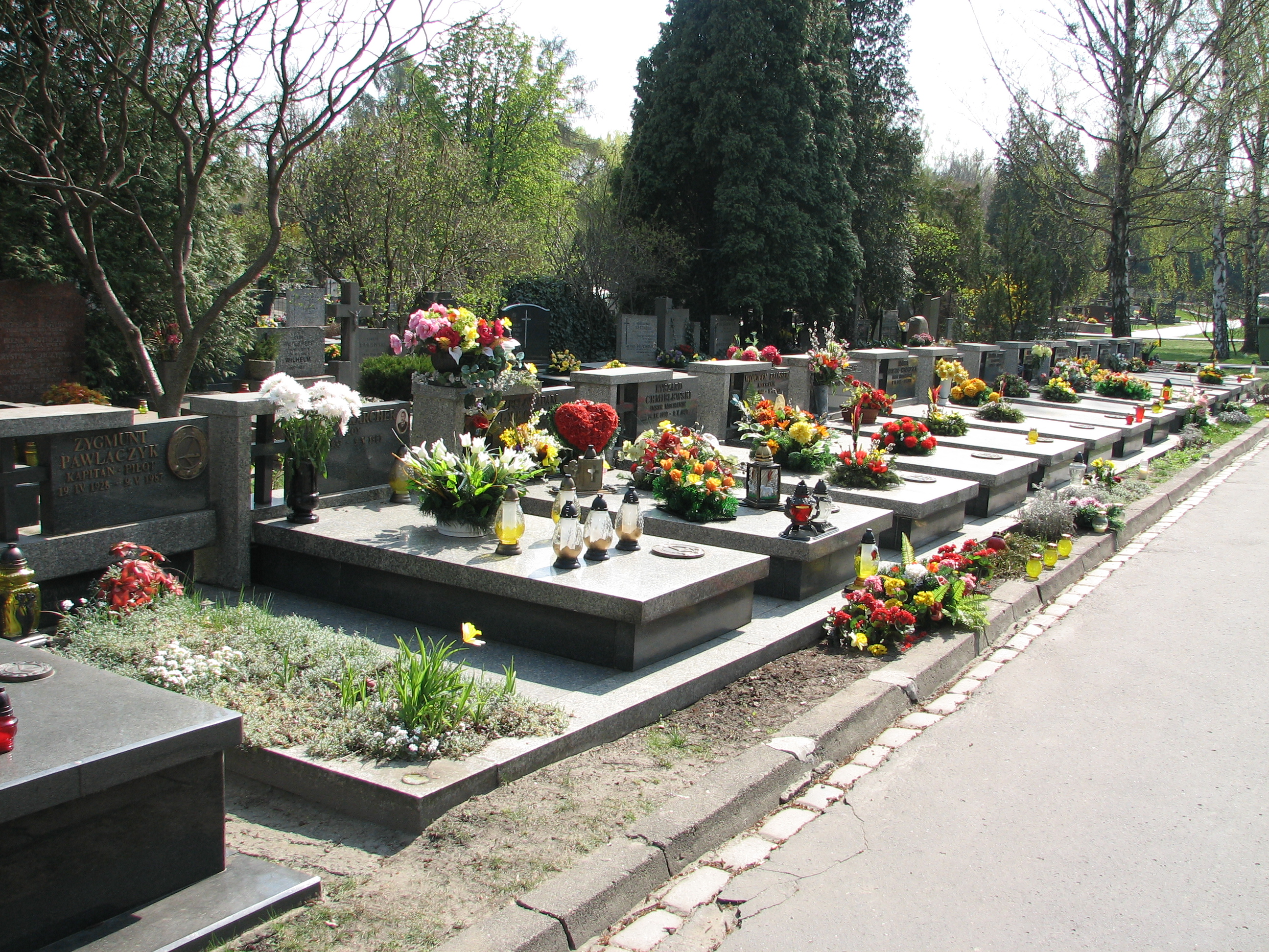 Groby załogi lotu LO 5055, który uległ katastrofie w Lesie Kabackim w dniu 9 maja 1987 roku - Warszawa, Cmentarz Wojskowy na Powązkach